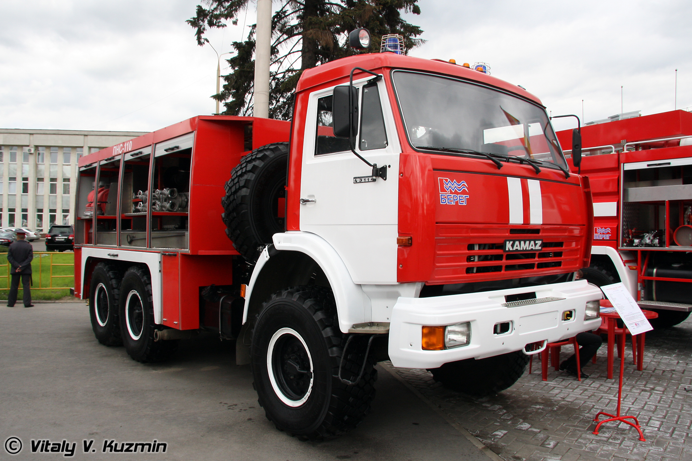 Пожарная насосная станция ПНС-110 на шасси КАМАЗ-43114 (Firefighting pump station PNS-110 on KAMAZ-43114 chassis)